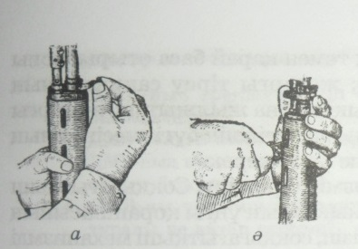 Handhabung des SWD-Scharfschützengewehres.